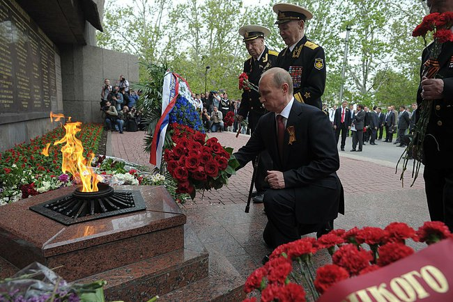 Возложение цветов к Мемориалу героическим защитникам Севастополя 1941–1942 годов.